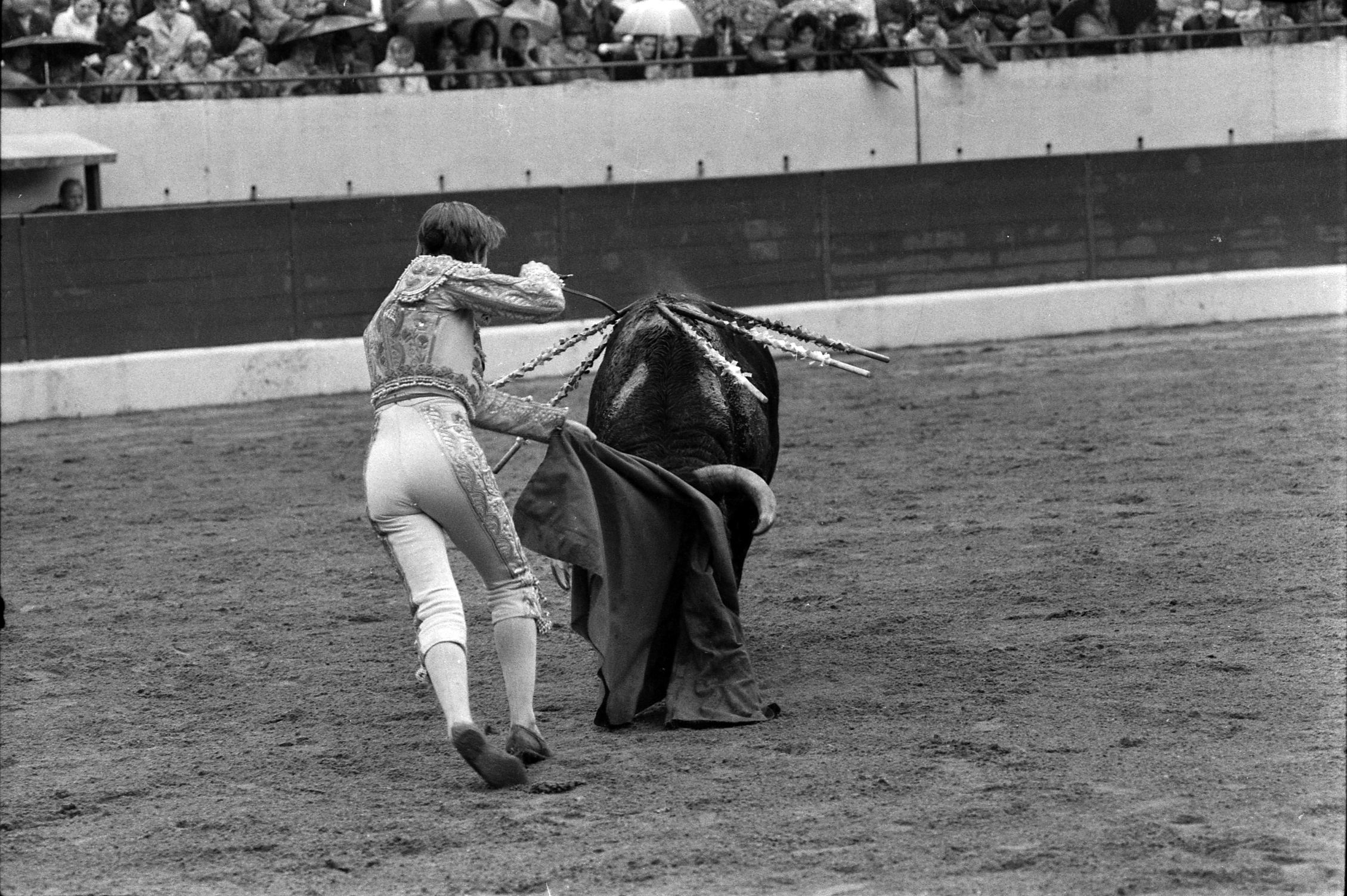 Corrida aux Arènes du Soleil d'Or (quartier des Arènes). 7 mai 1970. Scène de tauromachie, scène de mise à mort du taureau (estocade). Au premier plan vue de dos de Curro Vazquez qui va planter son épée dans le cou du taureau; en arrière-plan premiers rangs des gradins avec spectateurs. Observation: Pour connaître les caractéristiques du taureau (âge, poids...), voir dans le fonds bibliothèque le document intitulé "Arènes du Soleil d'Or (avril 1955 - octobre 1966)", cote 2397. Ce document compile les copies des notes manuscrites prises lors des corridas.